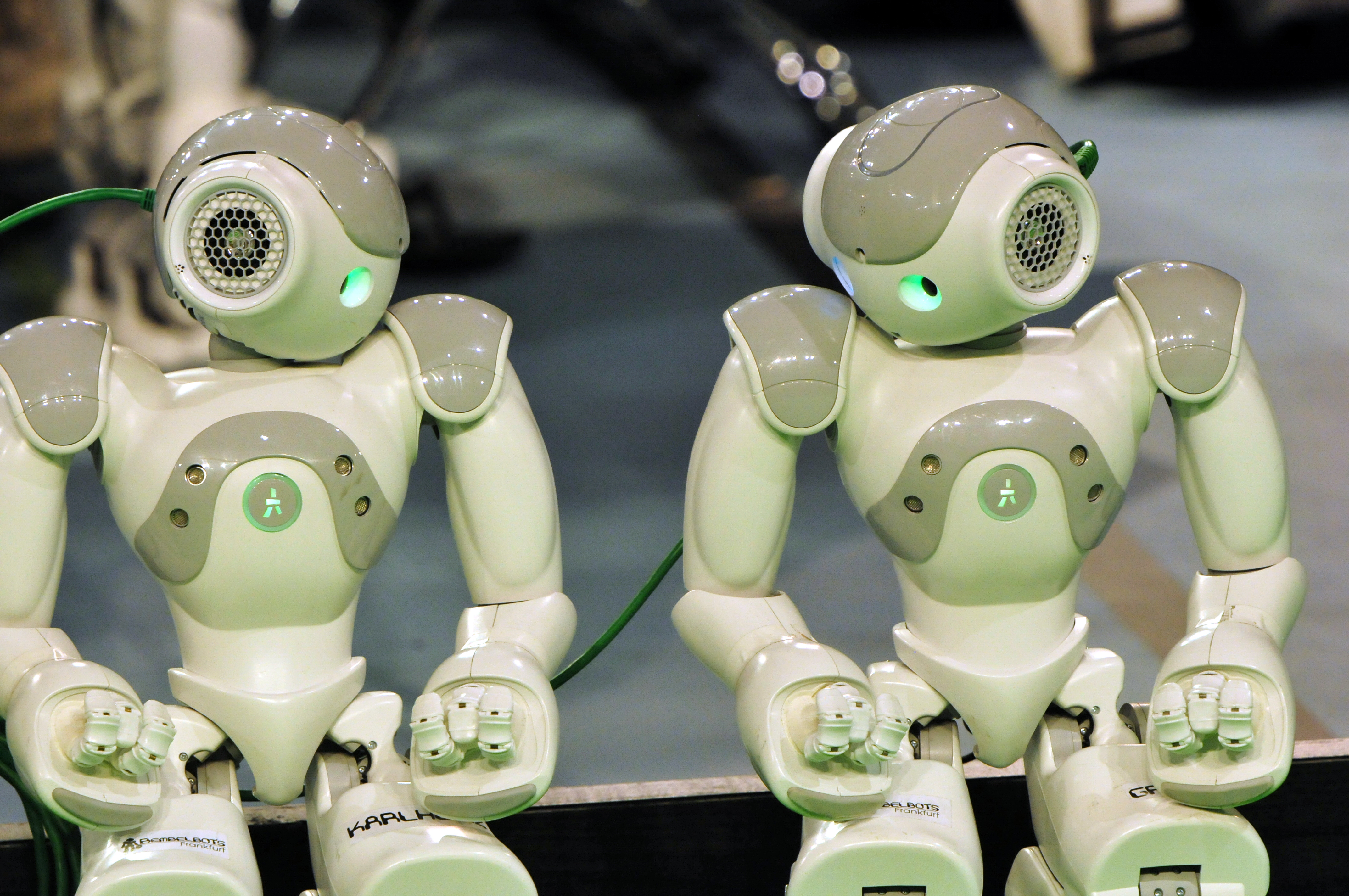 Eindhoven, Niederlande, Robocup 2013